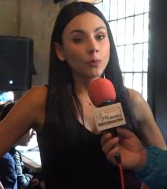 Carolina Gaitán en una entevista en 2016